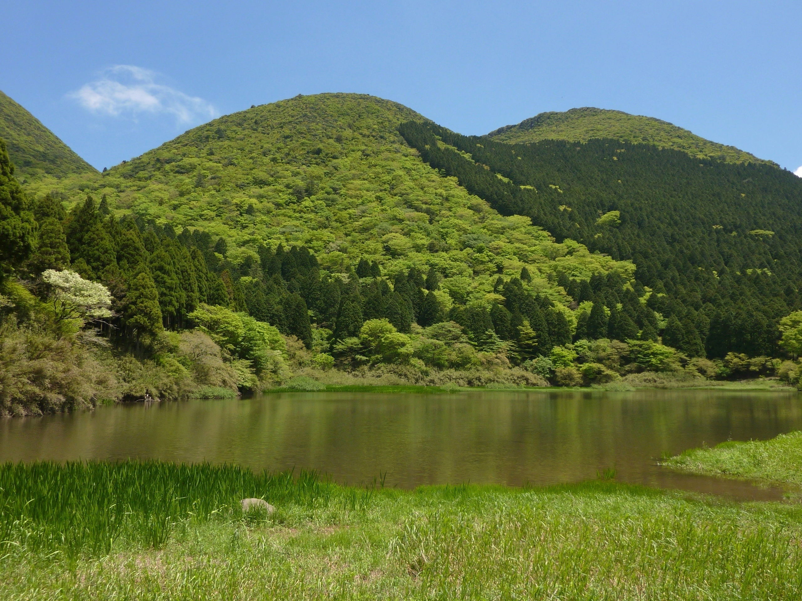 お玉ヶ池と下二子山 神奈川県箱根町